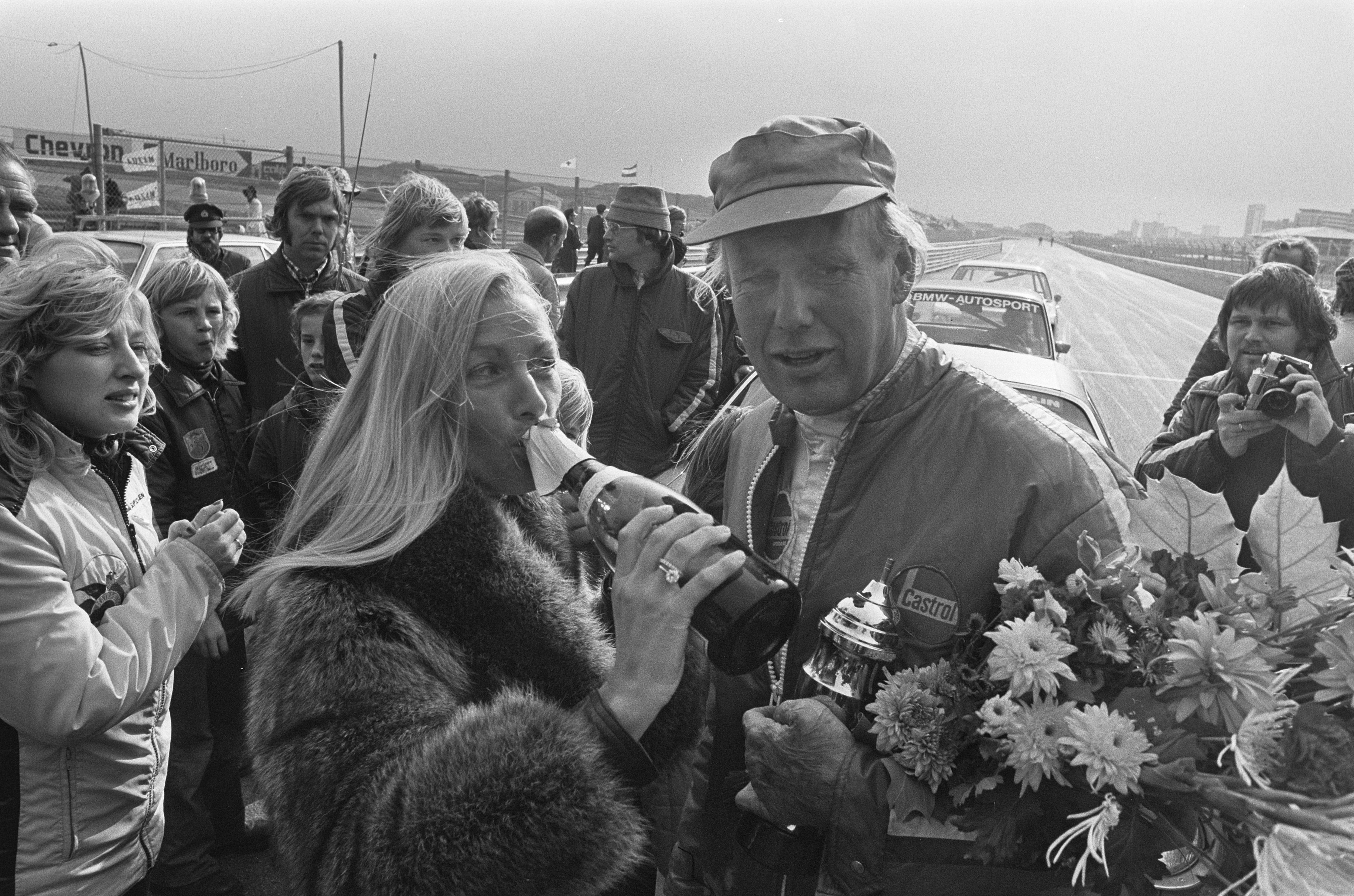 Finaleraces Nederlandse kampioenschappen op Zandvoort; formule V 1300 , Rob Slotemaker werd kampioen (r), Liane Keizer Engeman drinkt chamagne op